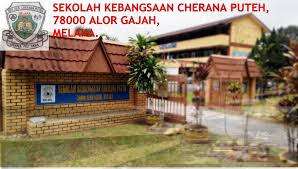 sek tercinta